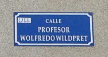 En 2009 la Universidad de La Laguna le dedico al profesor Wolfredo Wildpret una calle del campus de Anchieta